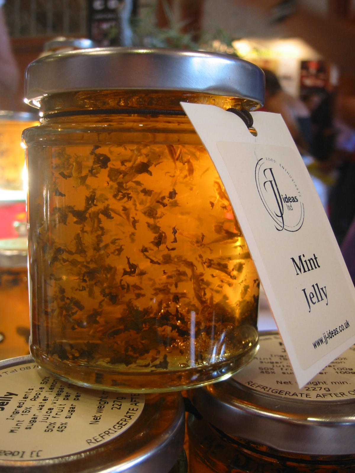 Mint jelly